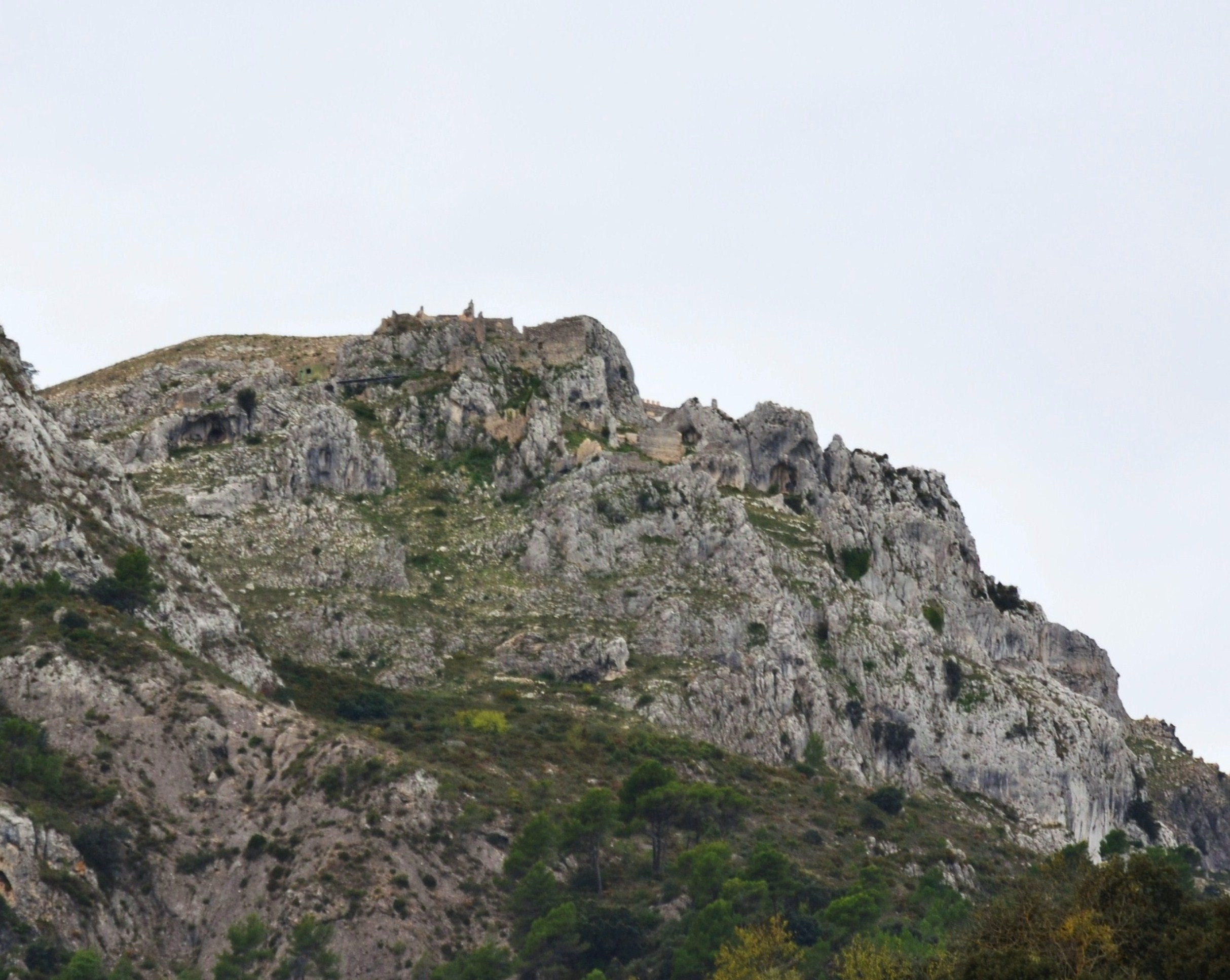 Castell d'Alcalà o de Benissili (la Vall de Gallinera).